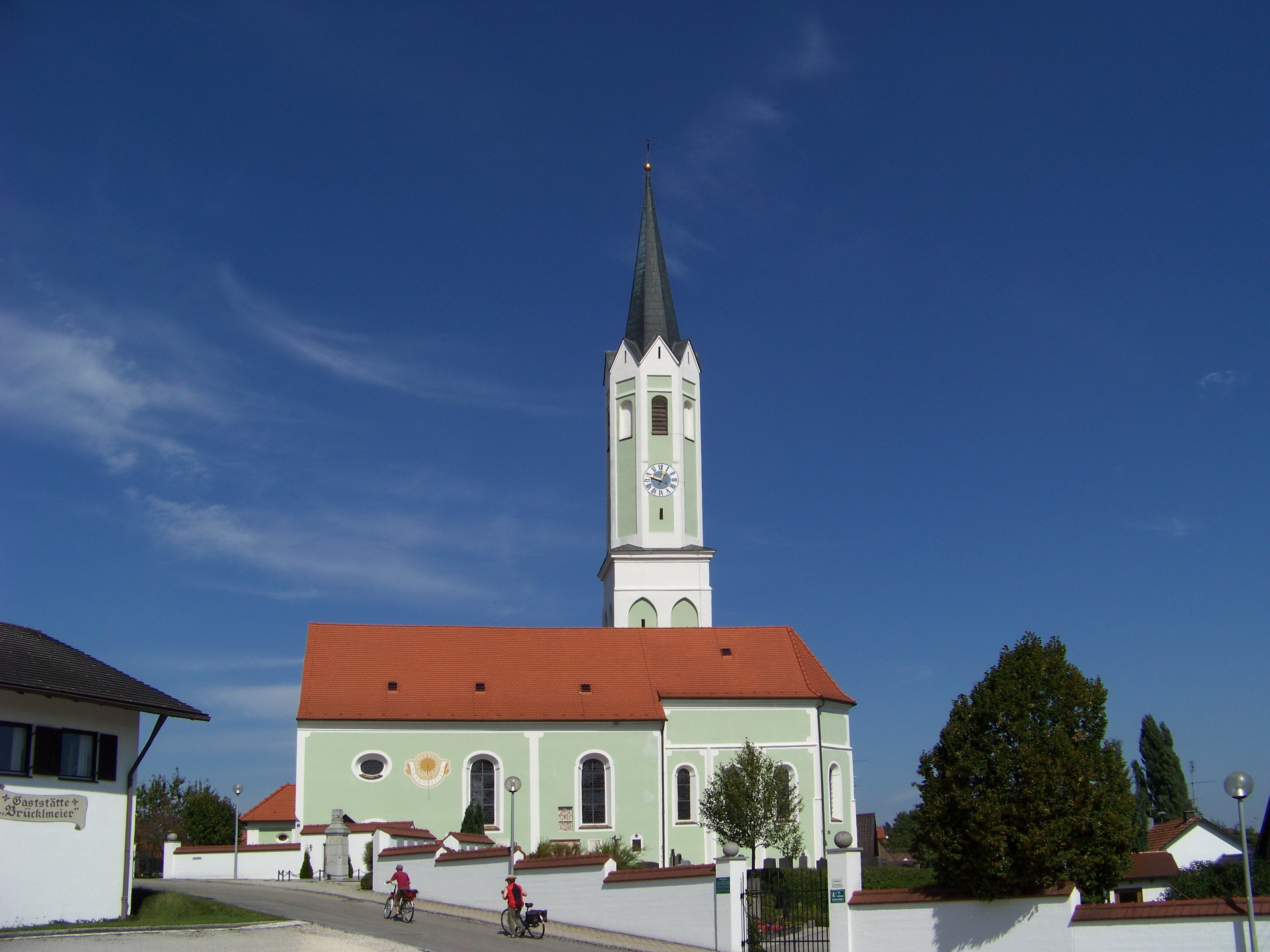 Hohenthann, Schmatzhausen. Kirche St. Katharina. Langhaus im Kern 13. Jahrhundert, Chor und Turm 15. Jahrhundert, nach 1680 barockisiert; mit Ausstattung; Seelenkapelle, 1. Hälfte 19. Jahrhundert; im Friedhof.